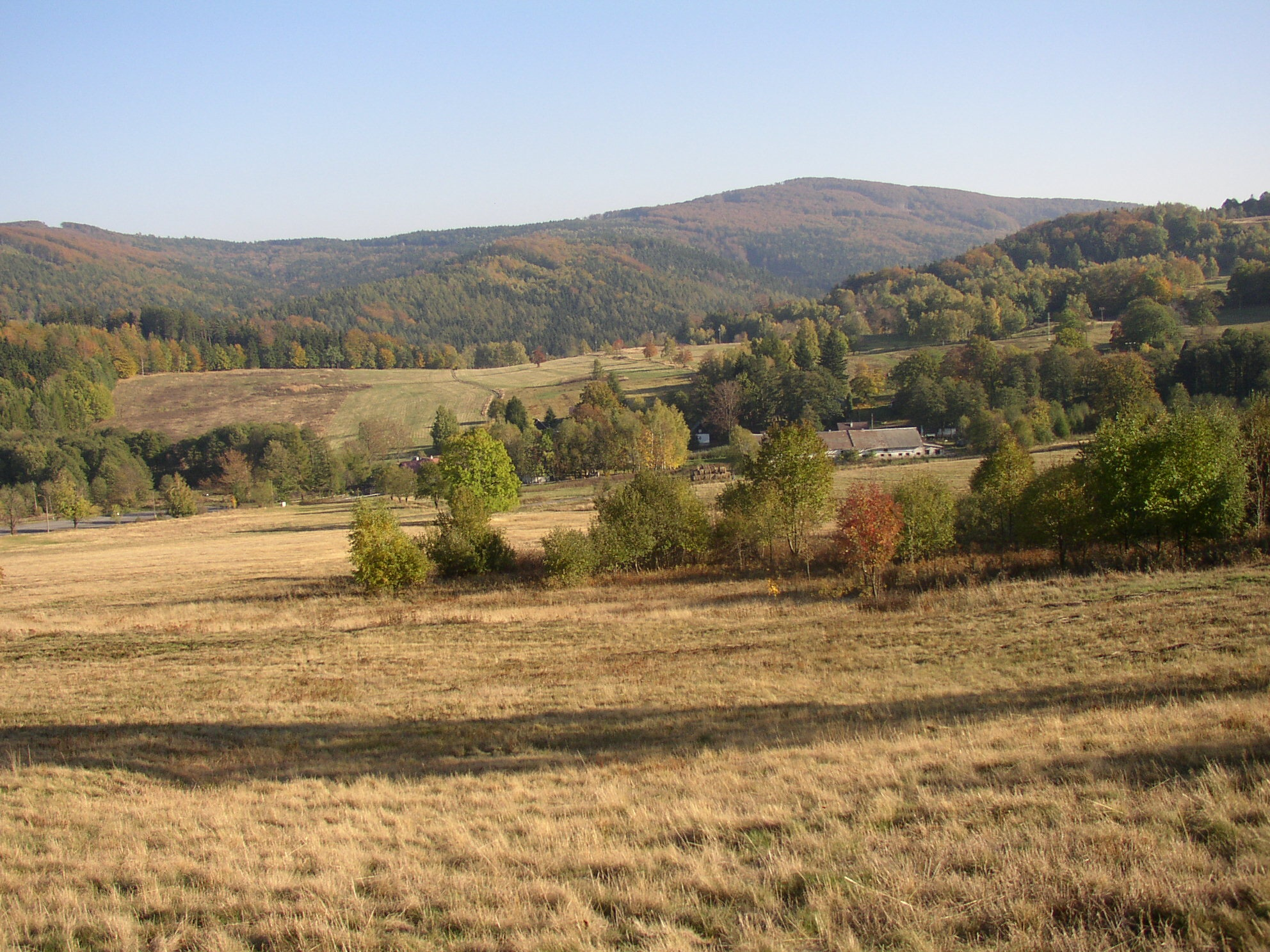 Pěnkavčí vrch, podlhed z Křížové hory